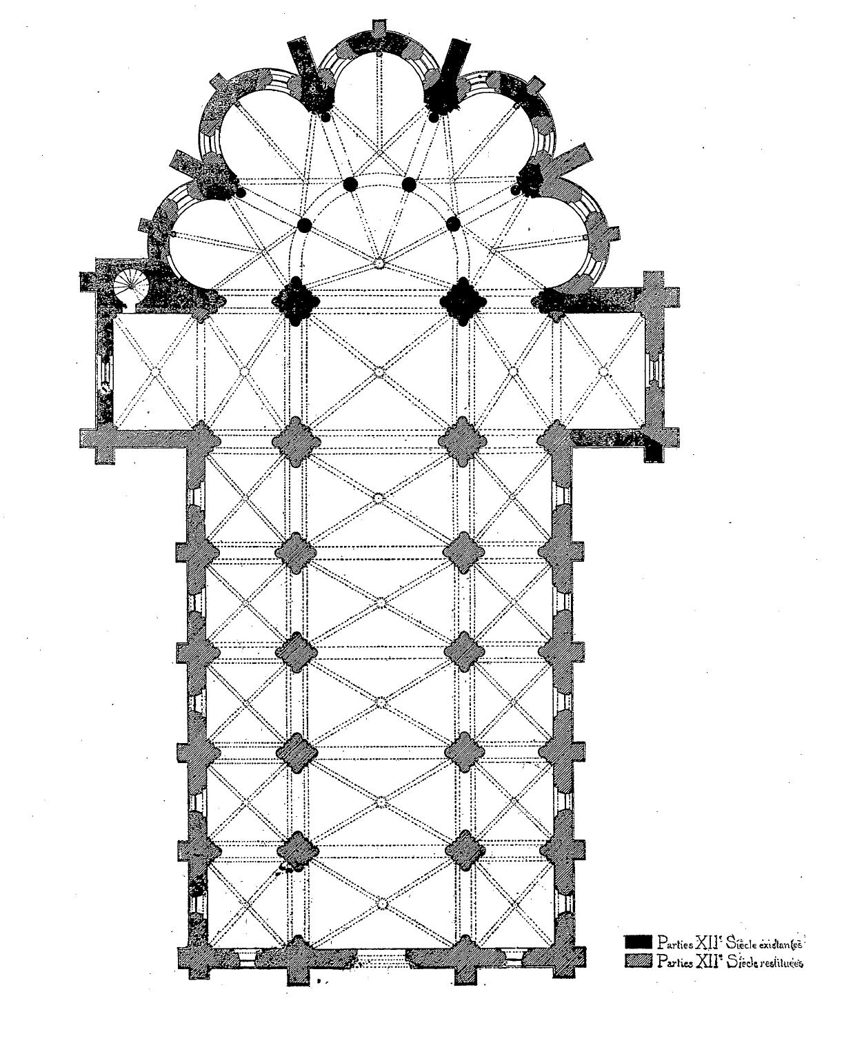 Plan restitué de l'église_Saint-Maclou à la fin de la construction, seconde moitié du XIIe siècle.